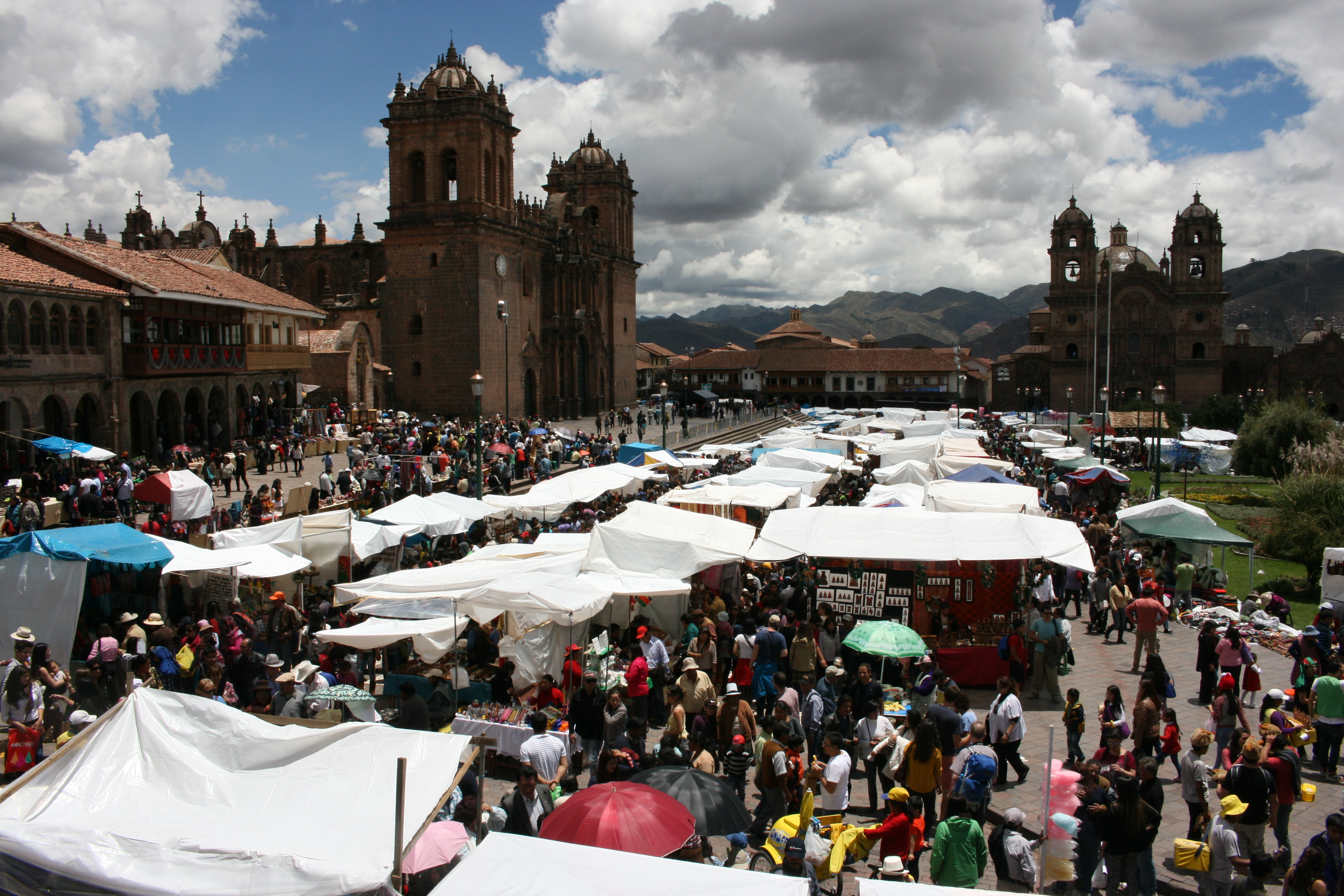 Santurantikuy - Weihnachtsmarkt